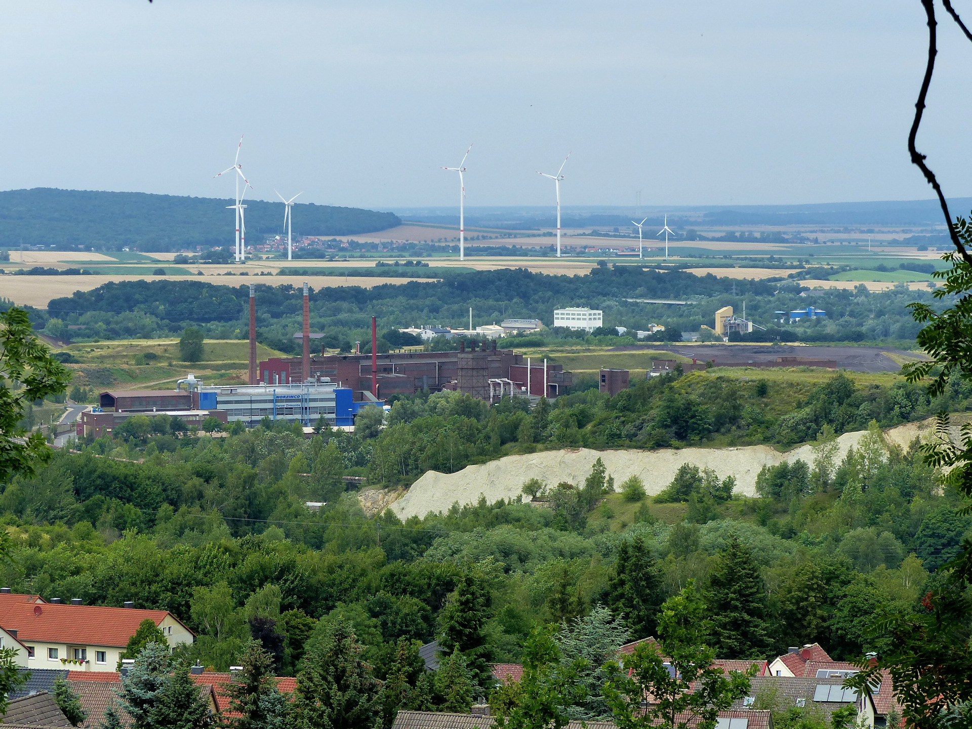 Blick auf die Zinkhütte zwischen Oker und Harlingerode, im Vordergrund Kalkabbaugebiet "Röseckenbach"